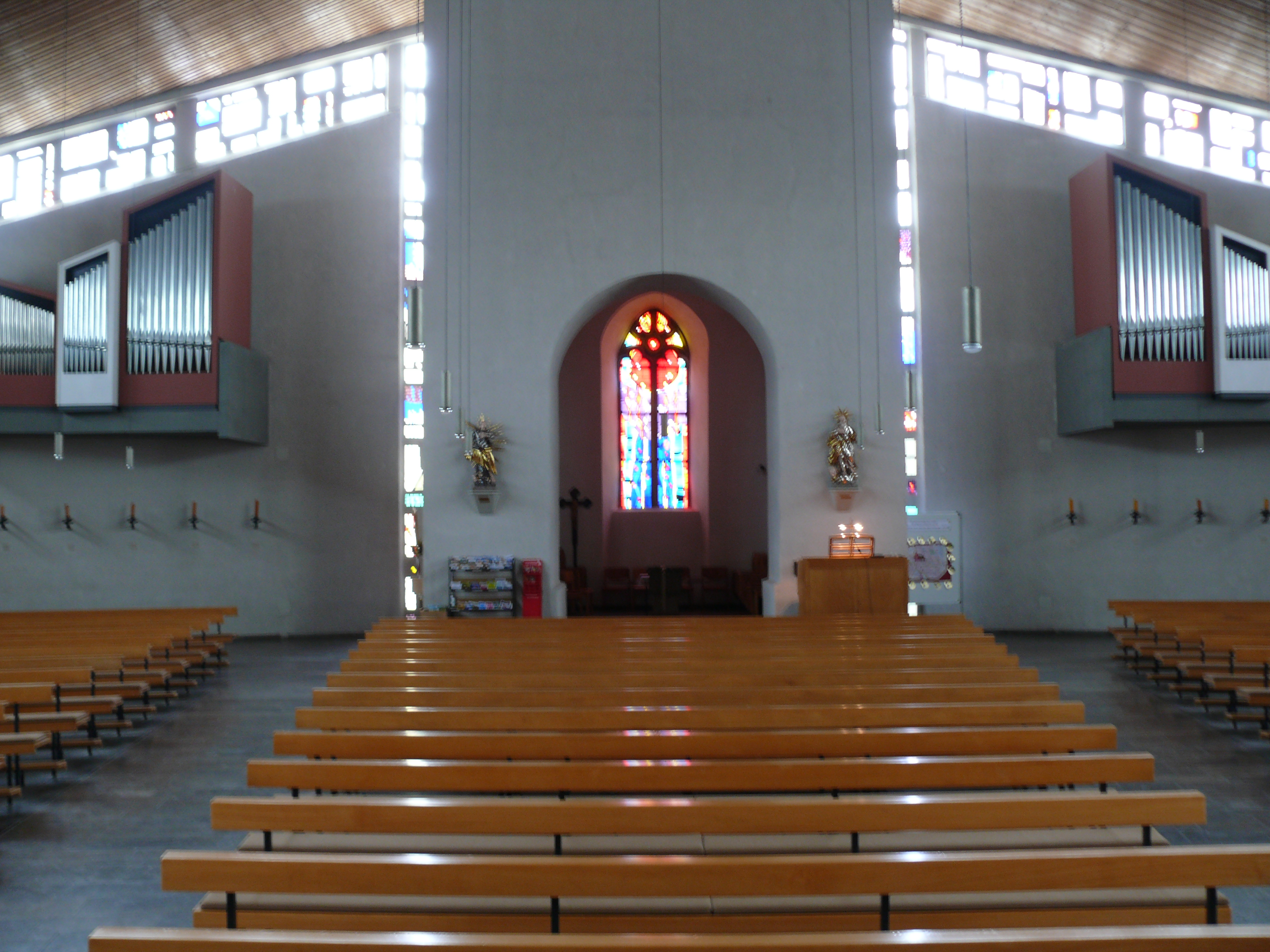 Pfarrkirche St. Bartholomäus Bergtheim; Blick vom Altar zum Turm